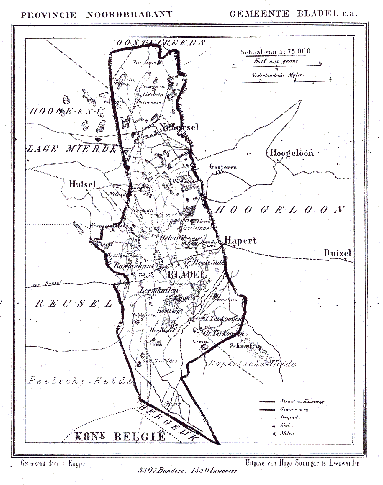 Nederland, Noord-Brabant, Gemeente Bladel